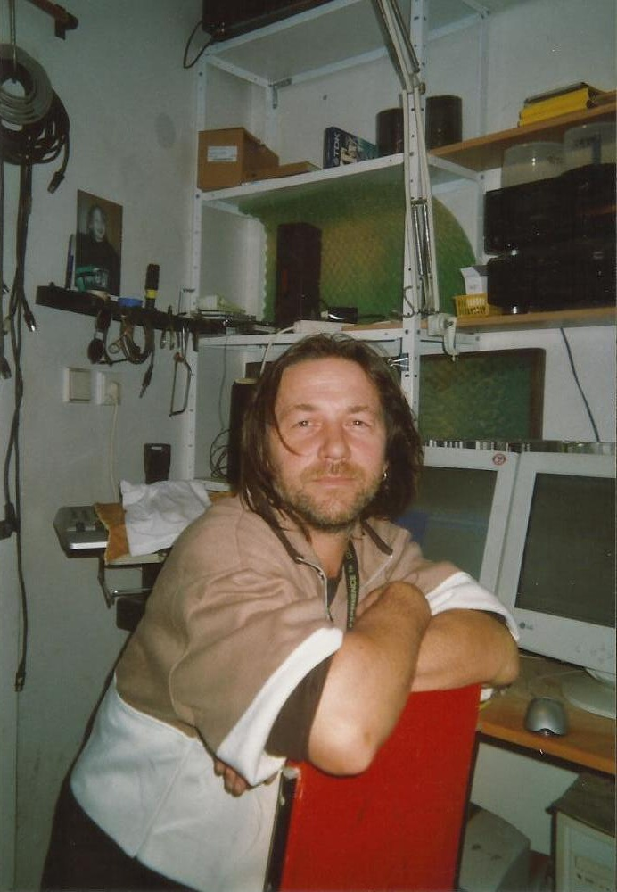 Štěpán Kojan